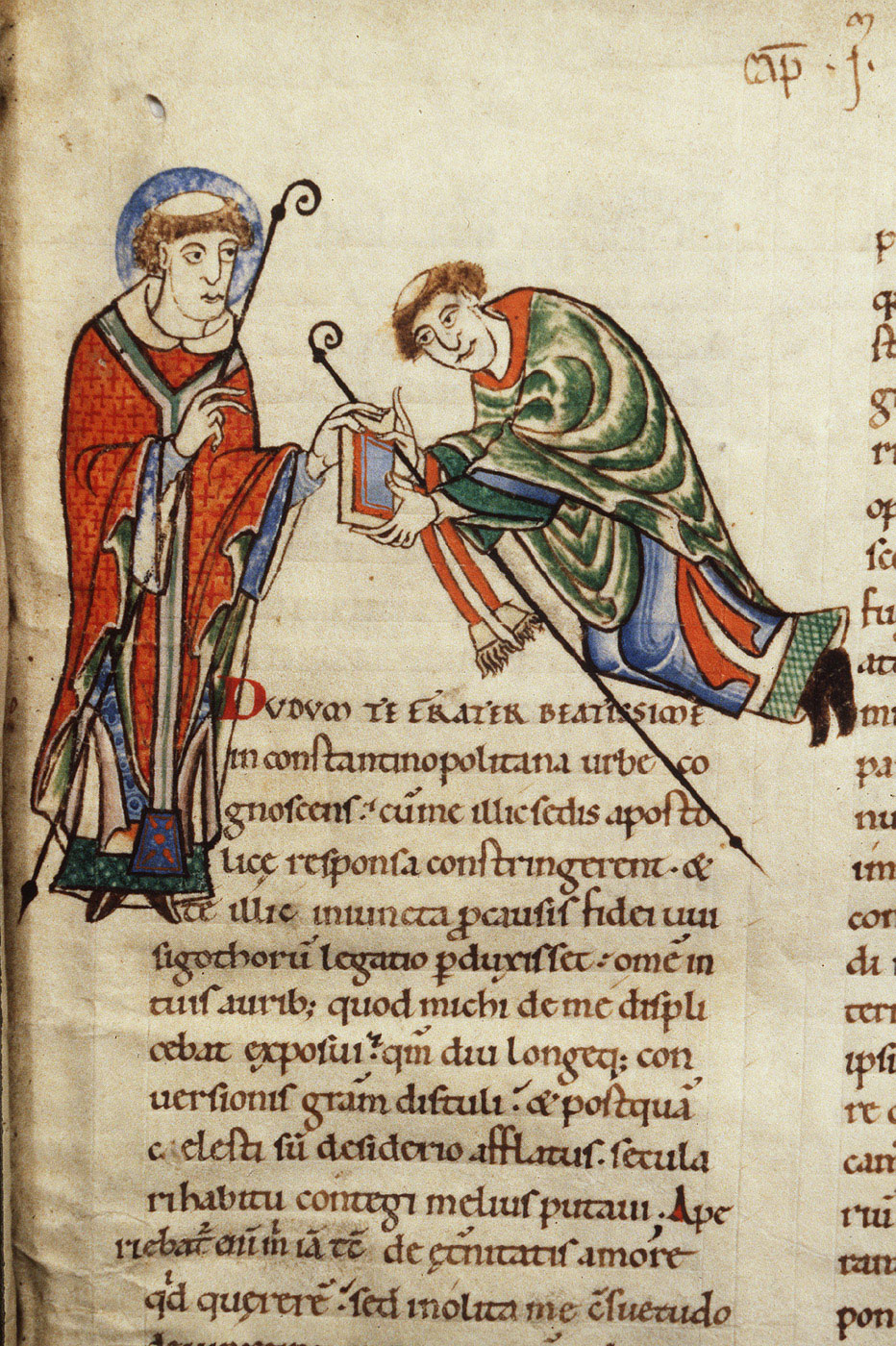 Saint Grégoire remettant ses commentaires sur le livre de Job à l'évêque Léandre Moralia in Job, Saint Grégoire. Cîteaux (Bourgogne), Dijon, 1100-1150 (Dijon, B.m., ms. 0168, f. 005, 168) Catégorie:Manuscrit enluminé